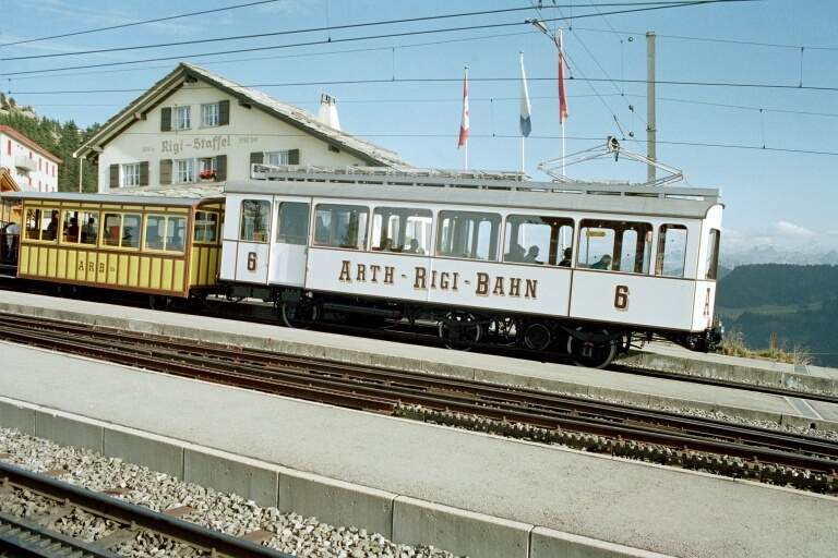 Switzerland Arth Rigi Rail The BCFhe 2/3 is the oldest Gear Railcar built in 1911. Arthrigibahn BCFhe 2/3 der älteste Zahnradtriebwagen der Welt gebaut 1911.